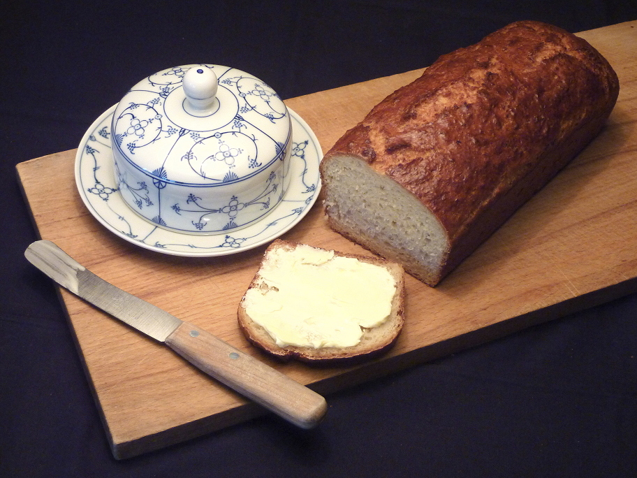 Kartoffelbrot („Reibekuchen“, im Siegerländer Plattdeutsch Riewekooche), eine Spezialität aus dem Siegerland im südlichen Nordrhein-Westfalen. Die abgebildete Butterdose trägt das Dekor Altes Zwiebelmuster (Manufaktur leider unbekannt), das daneben liegende Frühstücksmesser mit Holzgriff ist vom Hersteller Herder aus Solingen.